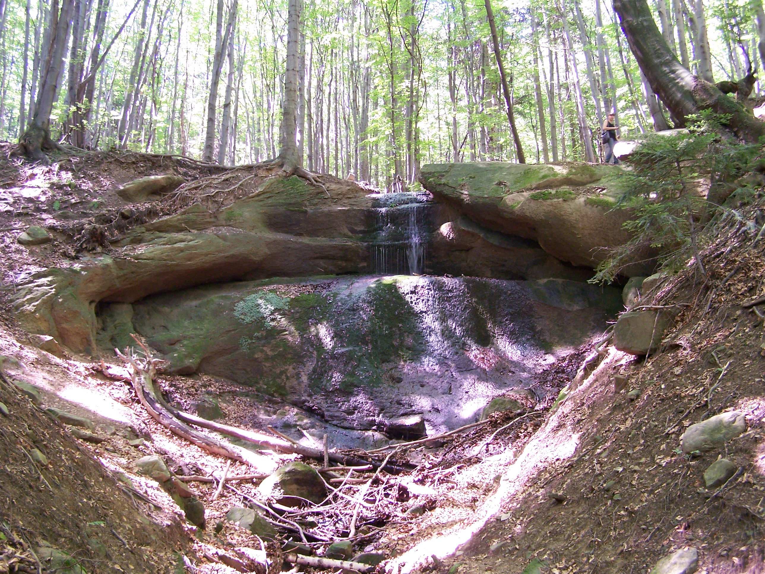 Wodospad Magurski - Folusz